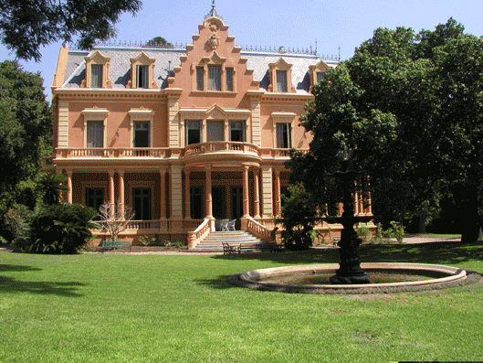 Presa da Wikipedia inglese, autore Nicolashelft, 30 October 2006